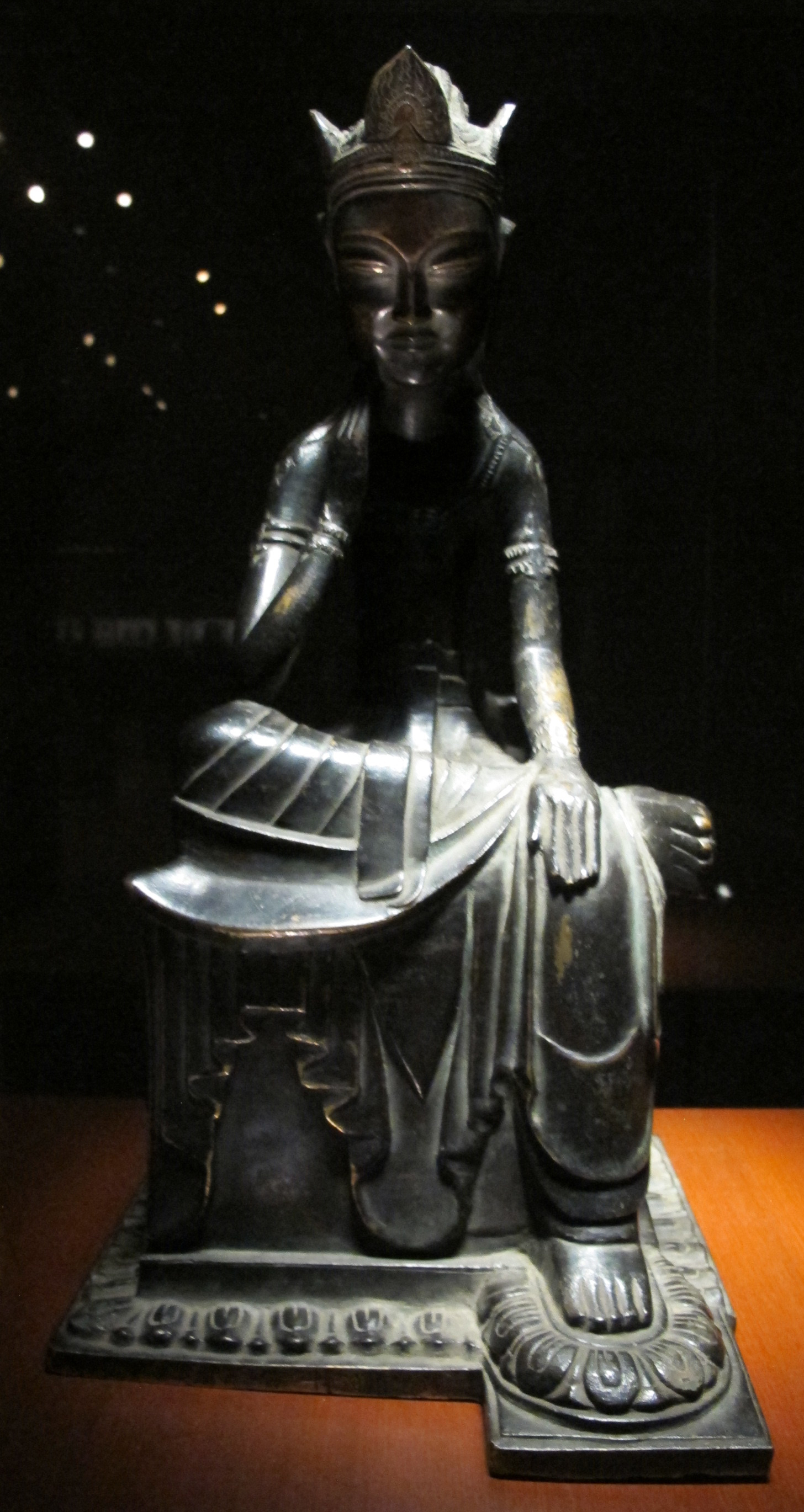 Periodo asuka, bodhisattva, datato 606 o 666